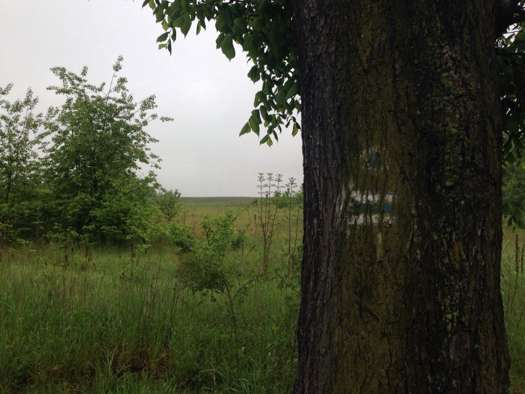 Szlak pieszy nr 3575 - początek w Darzyborze